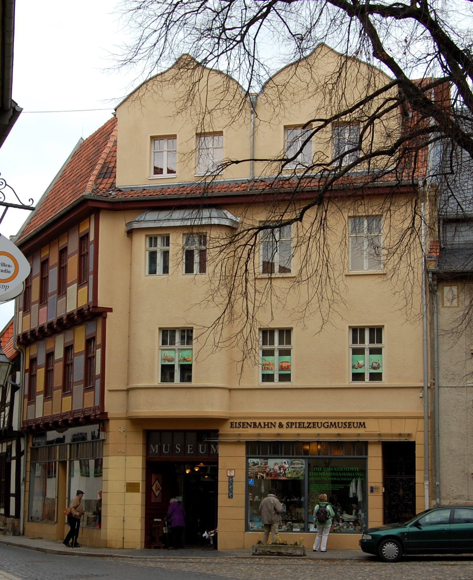 Quedlinburg Blasiistraße Eisenbahn- und Spielzeugmuseum